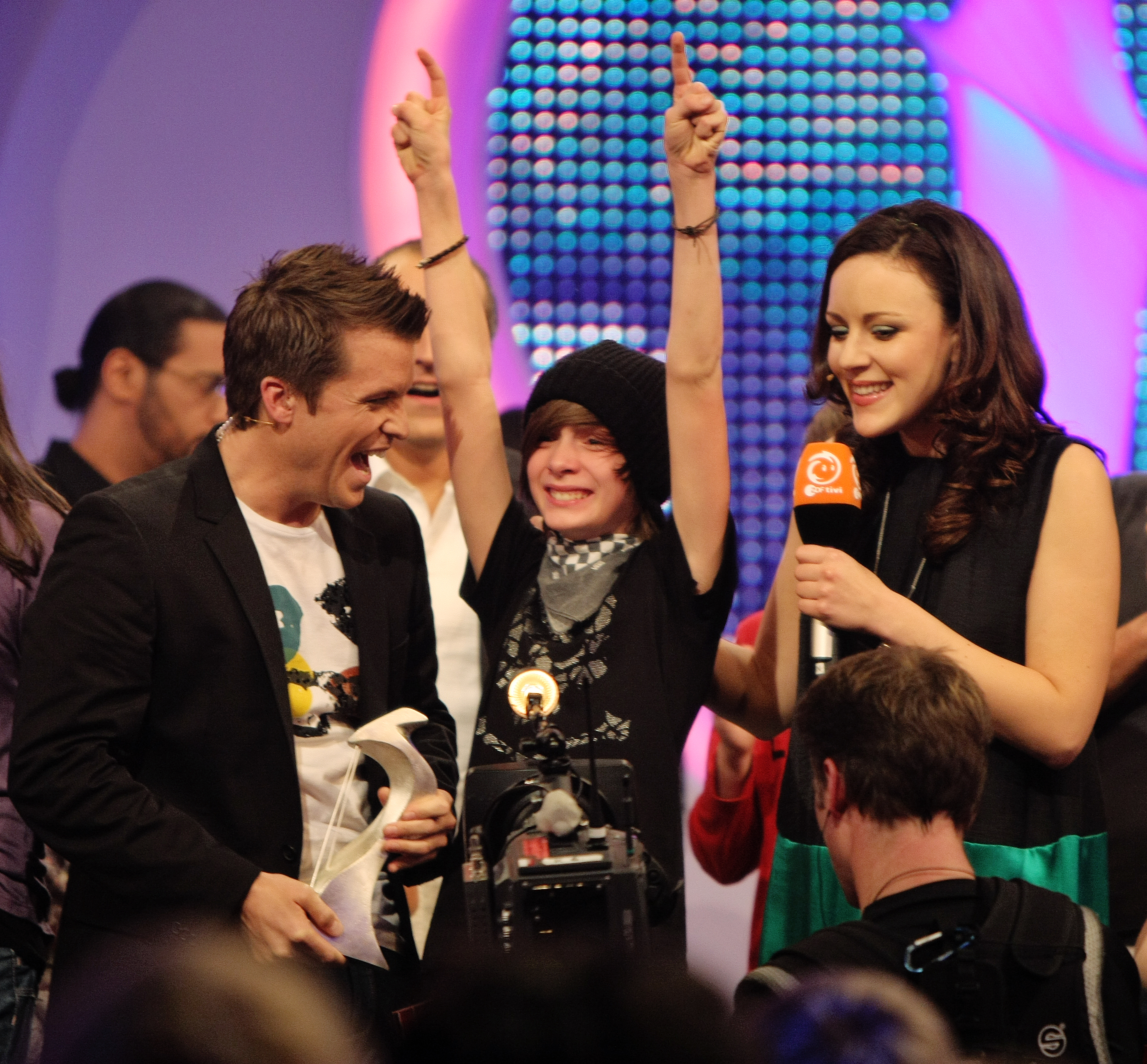 Gewinner von Dein Song